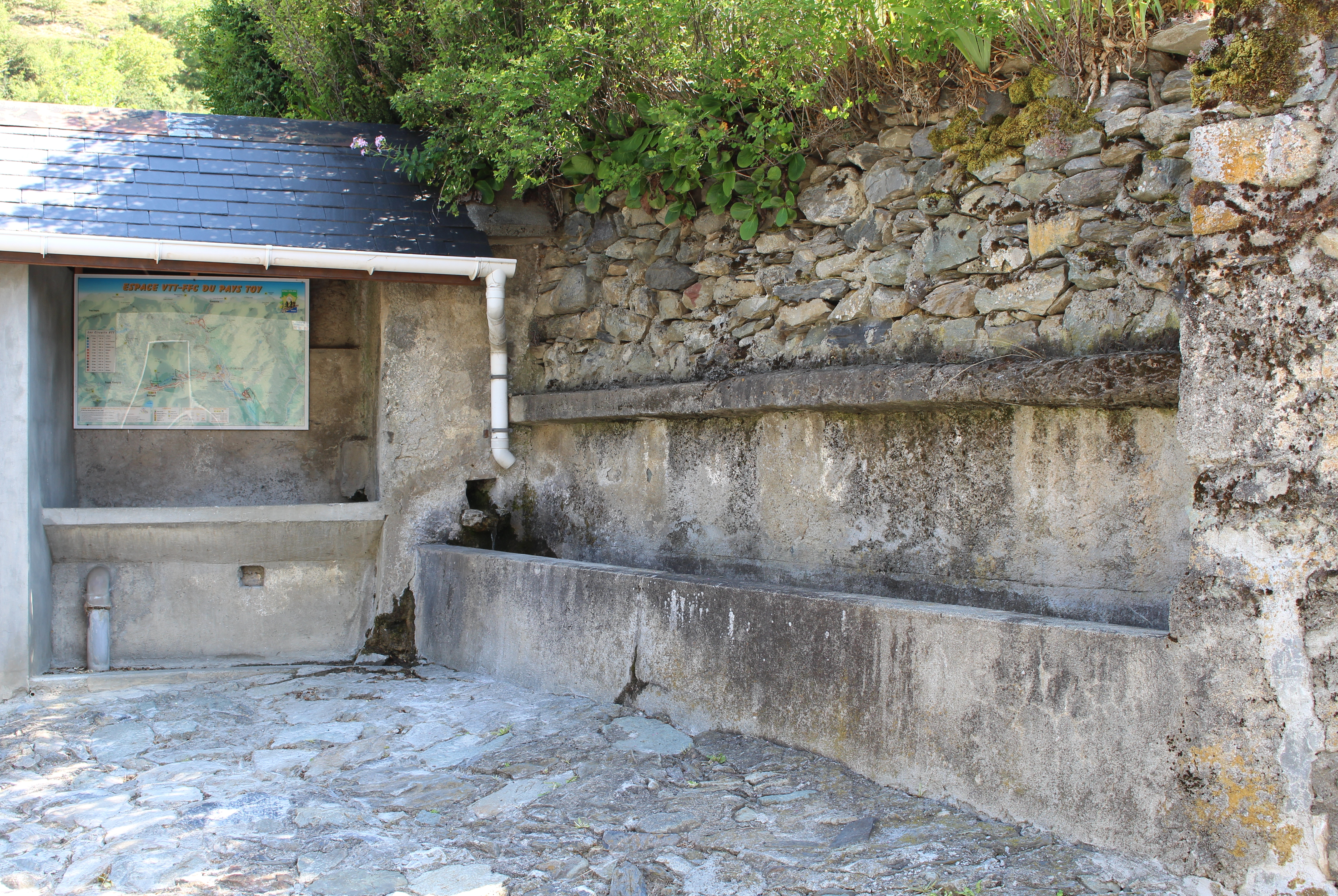 Lavoir de Vizos (Hautes-Pyrénées)